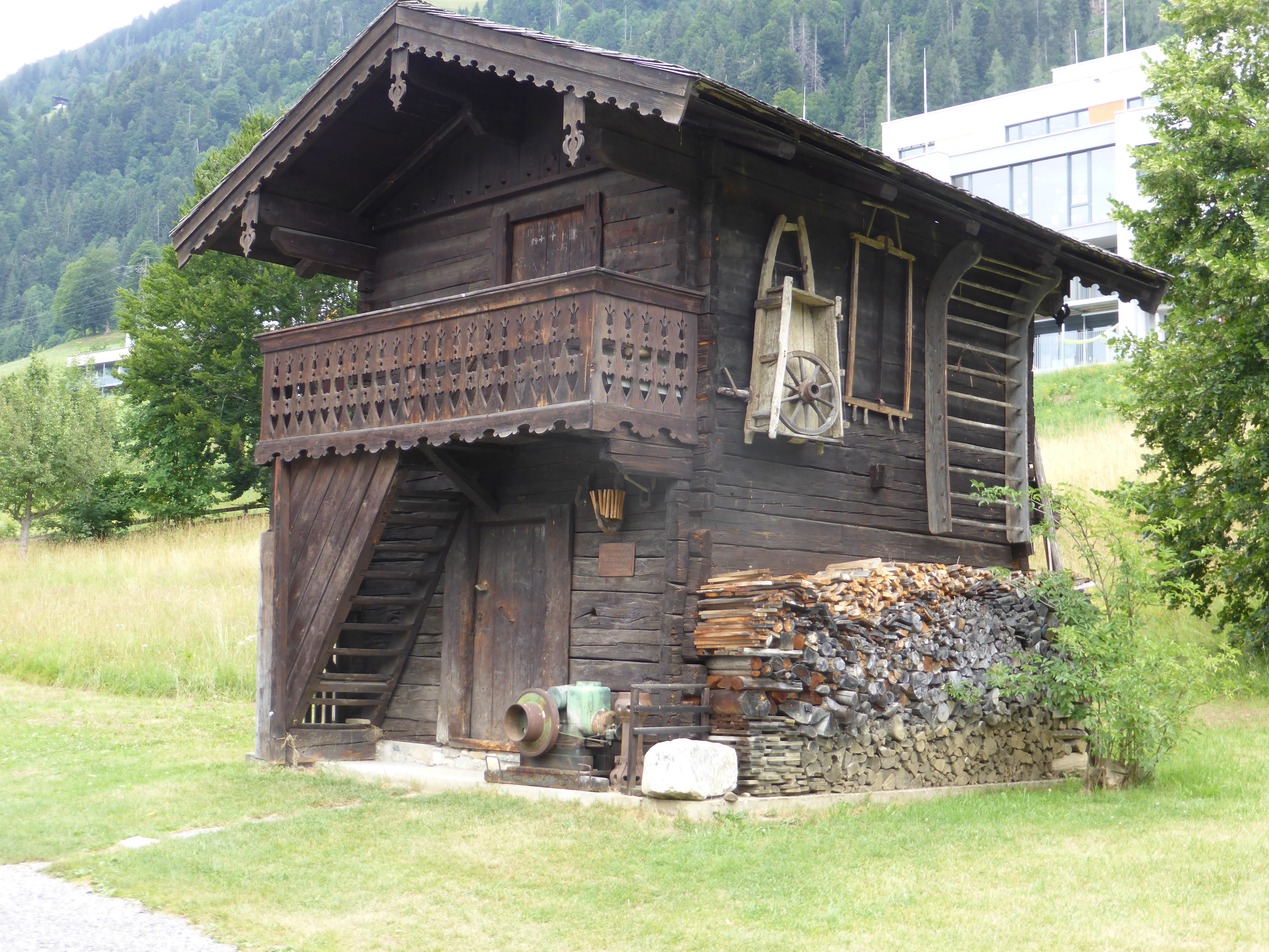 Bauernhaus, Heimatmuseum; Wallnergut